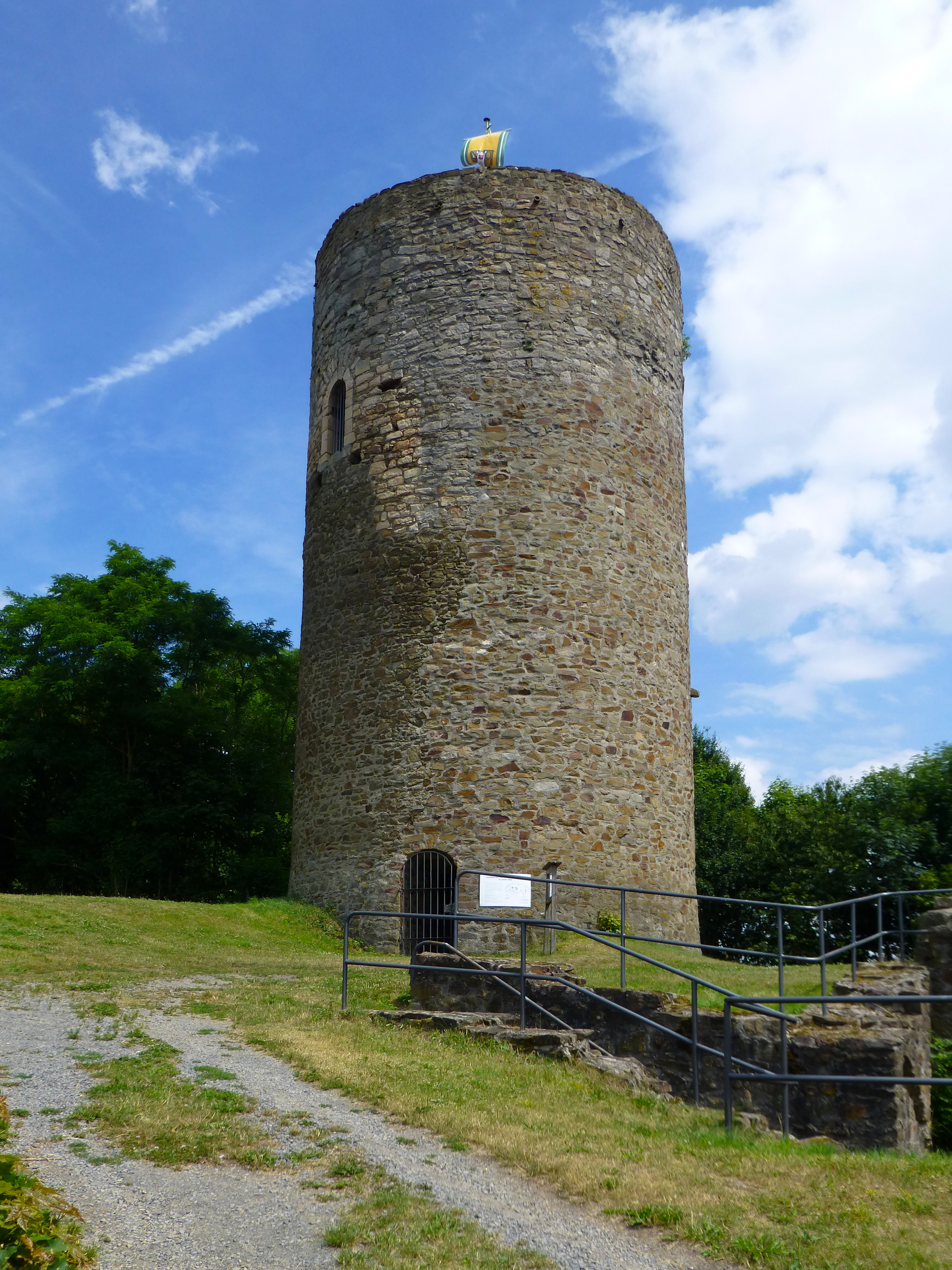 Bergfried der Burg Jesberg